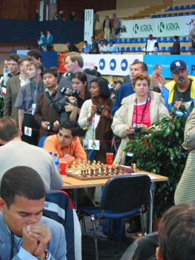 Olimpiada 2002 Bled. Fotografi nestrpno čakajo na Kasparova, ki nekoliko zamuja na partijo proti Indijcu.